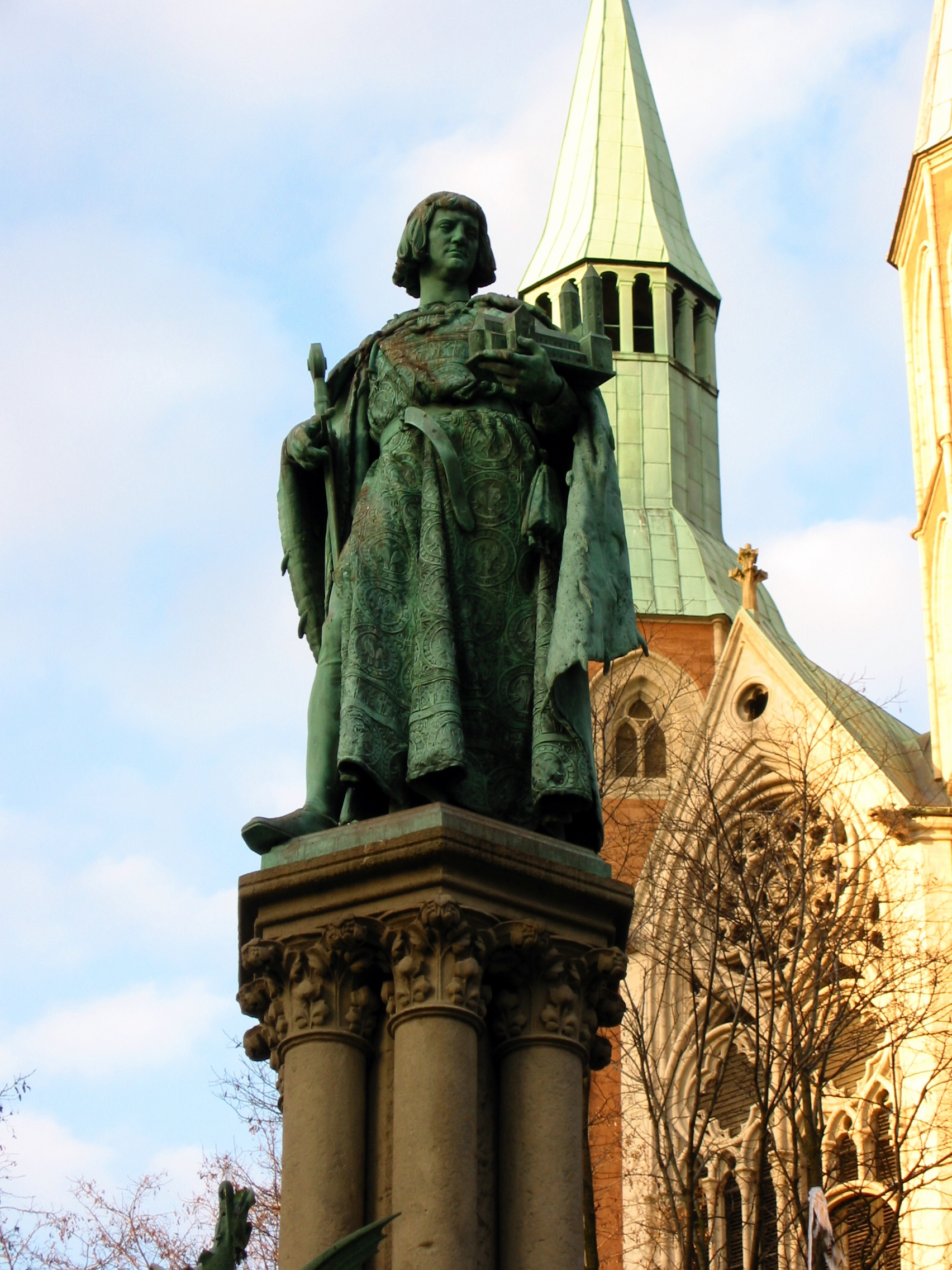 Braunschweig, Heinrichsbrunnen